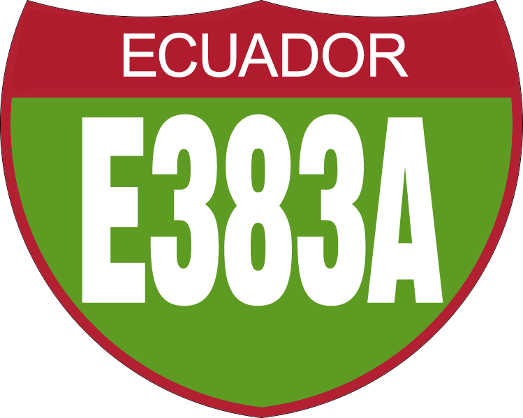 Disco de Identificación Vía Colectora E383A